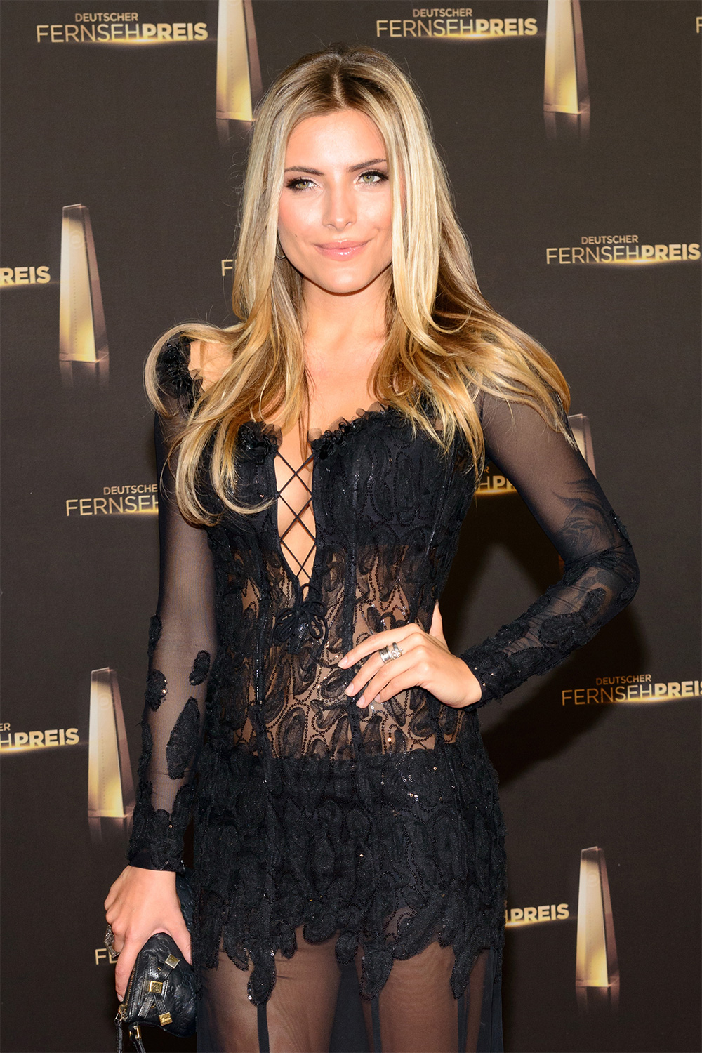 Ankunft von Sophia Tomalla auf dem 16. Deutschen Fernsehpreis am 2. Oktober 2014 in Köln.